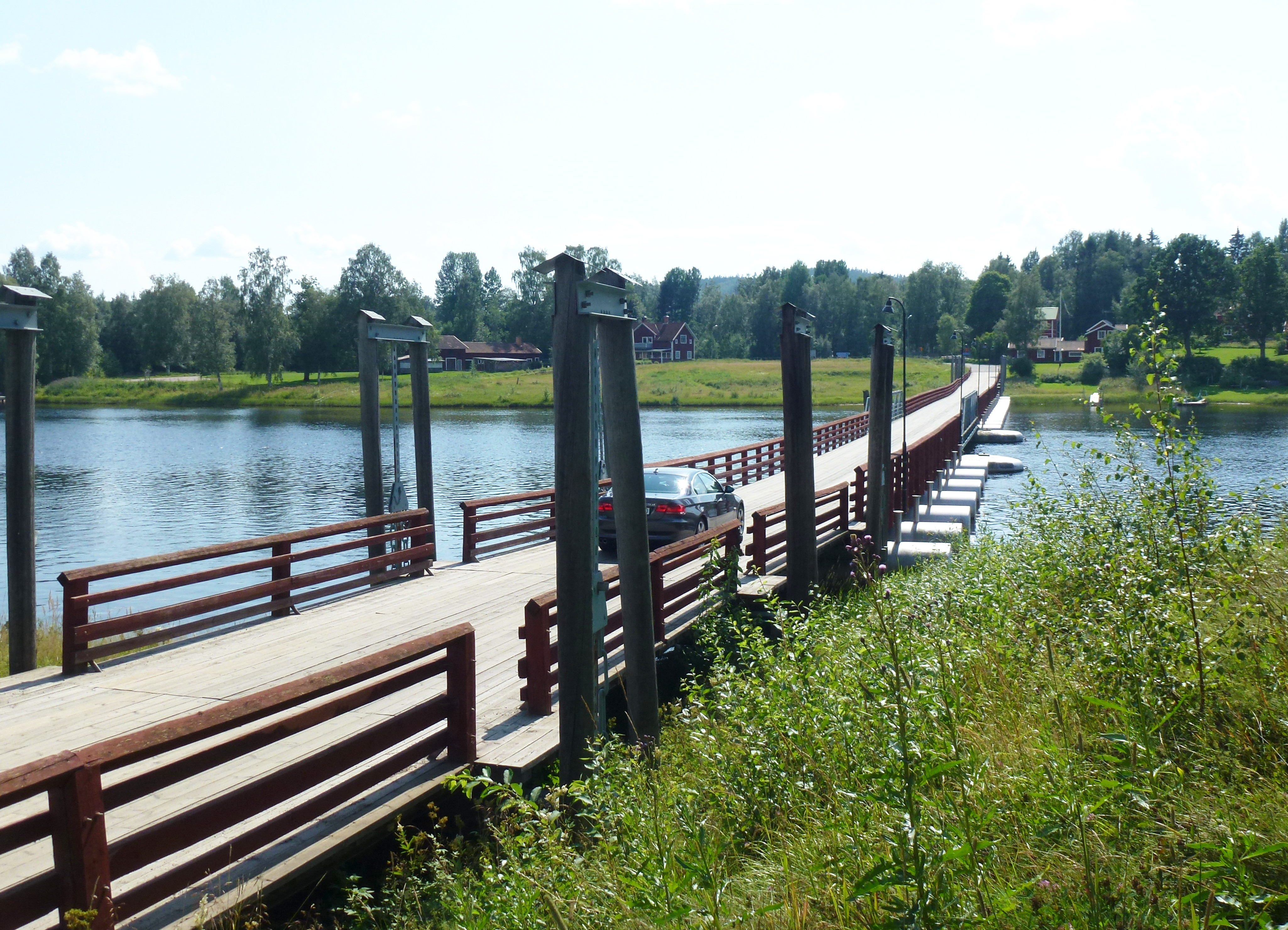 Flottbron i Gagnef